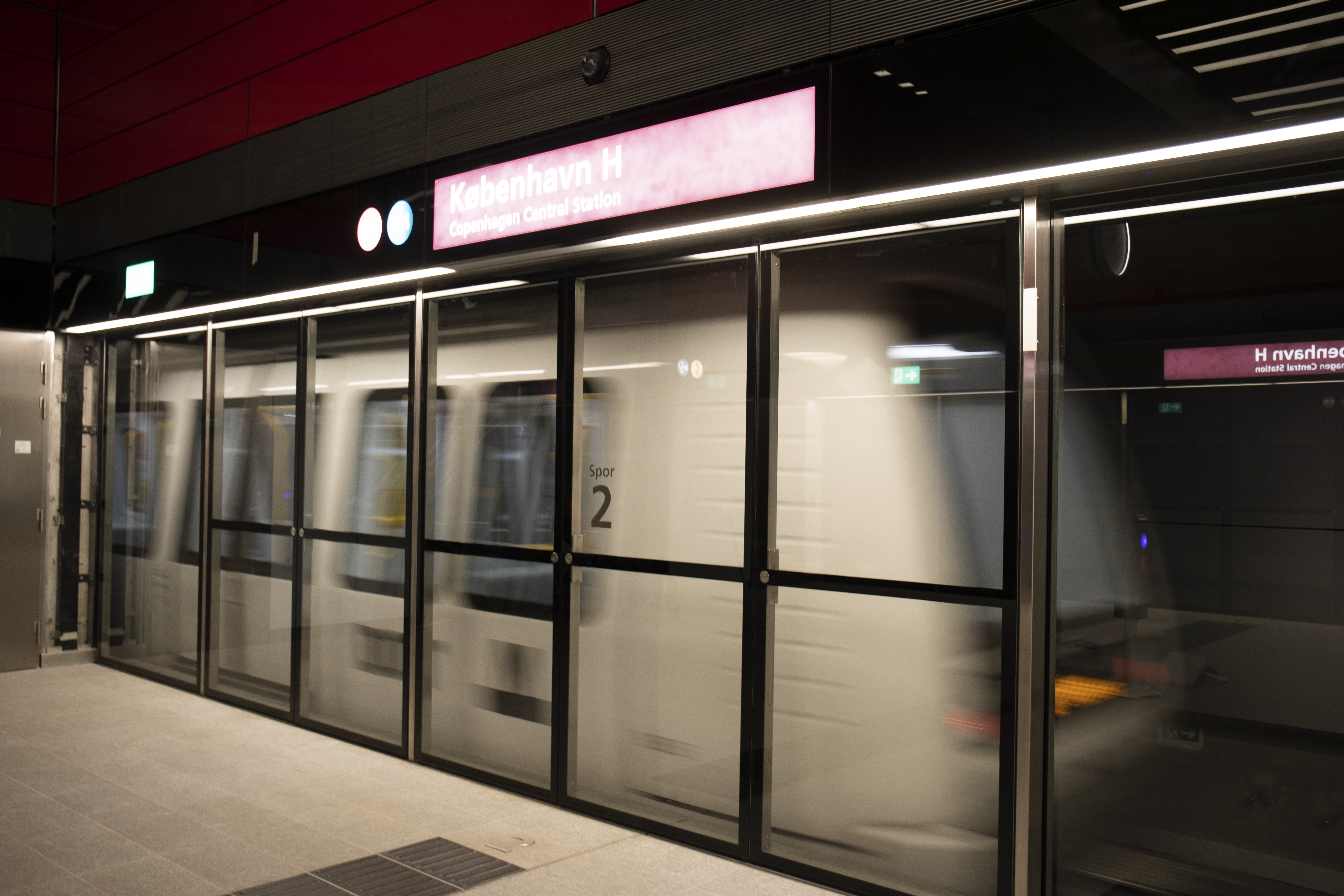 Pressvisning av nya Metrocityringen i Köpenhamn, som invigs söndagen den 29 september. Metrostationen vid Stampesgade, Københavns Hovedbanegård, finputsas inför invigningen. 2019-09-25. Photo: News Øresund - Anna Palmehag © News Øresund - Anna Palmehag (CC BY 3.0). Detta verk av News Øresund är licensierat under en Creative Commons Erkännande 3.0 Unported-licens (CC BY 3.0). Bilden får fritt publiceras under förutsättning att källa anges. .The picture can be used freely under the prerequisite that the source is given. News Øresund, Malmö, Sweden News Øresund är en oberoende regional nyhetsbyrå som är en del av det oberoende dansk-svenska kunskapscentrat Øresundsinstituttet.